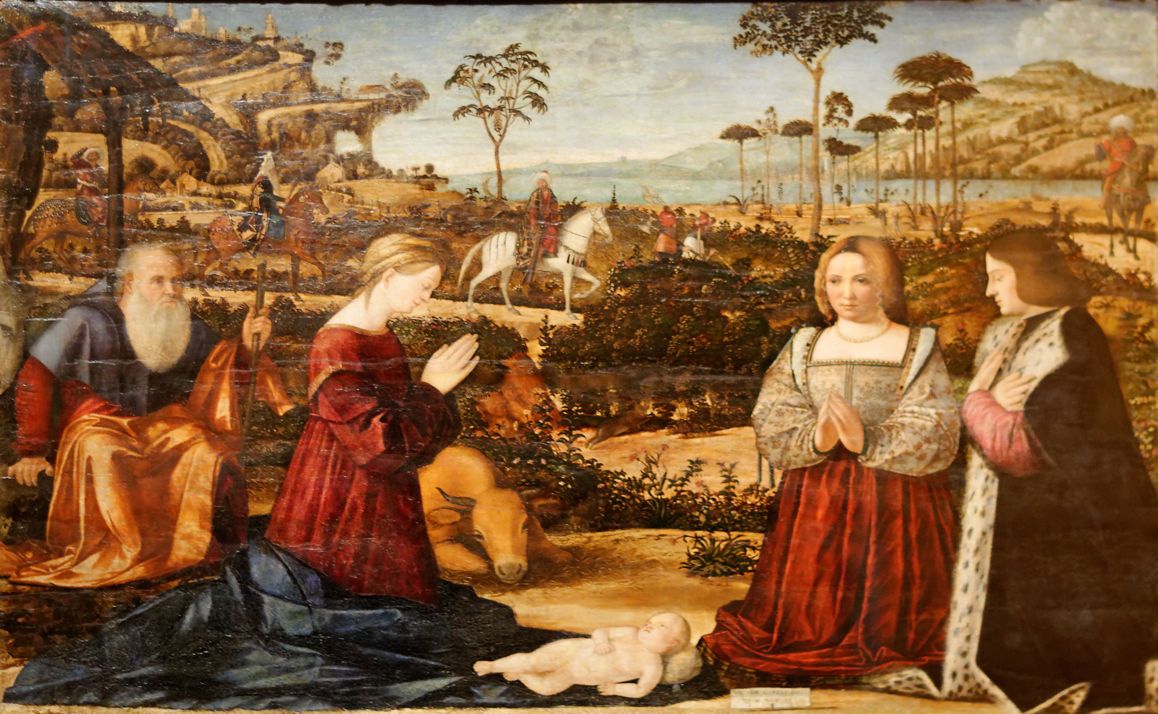 Holy Family with Two Donors, Vittore Carpaccio. Tempera sur toile,1505. Exposé au musée Calouste Gulbenkian, Lisbonne